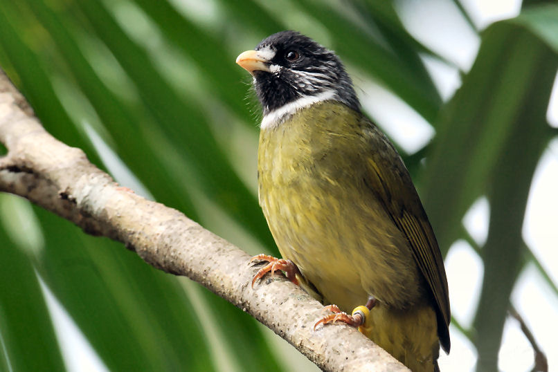 Collared finchbill bulbul Spizixos semitorques at Miami Merozoo